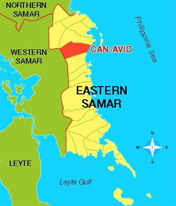 Winaray : Mapa han Can-avid